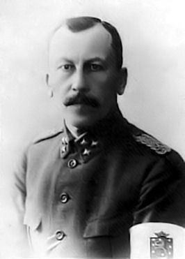 Karl Emil Berg